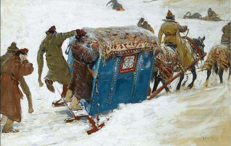 Боярский возок / Боярские холопы